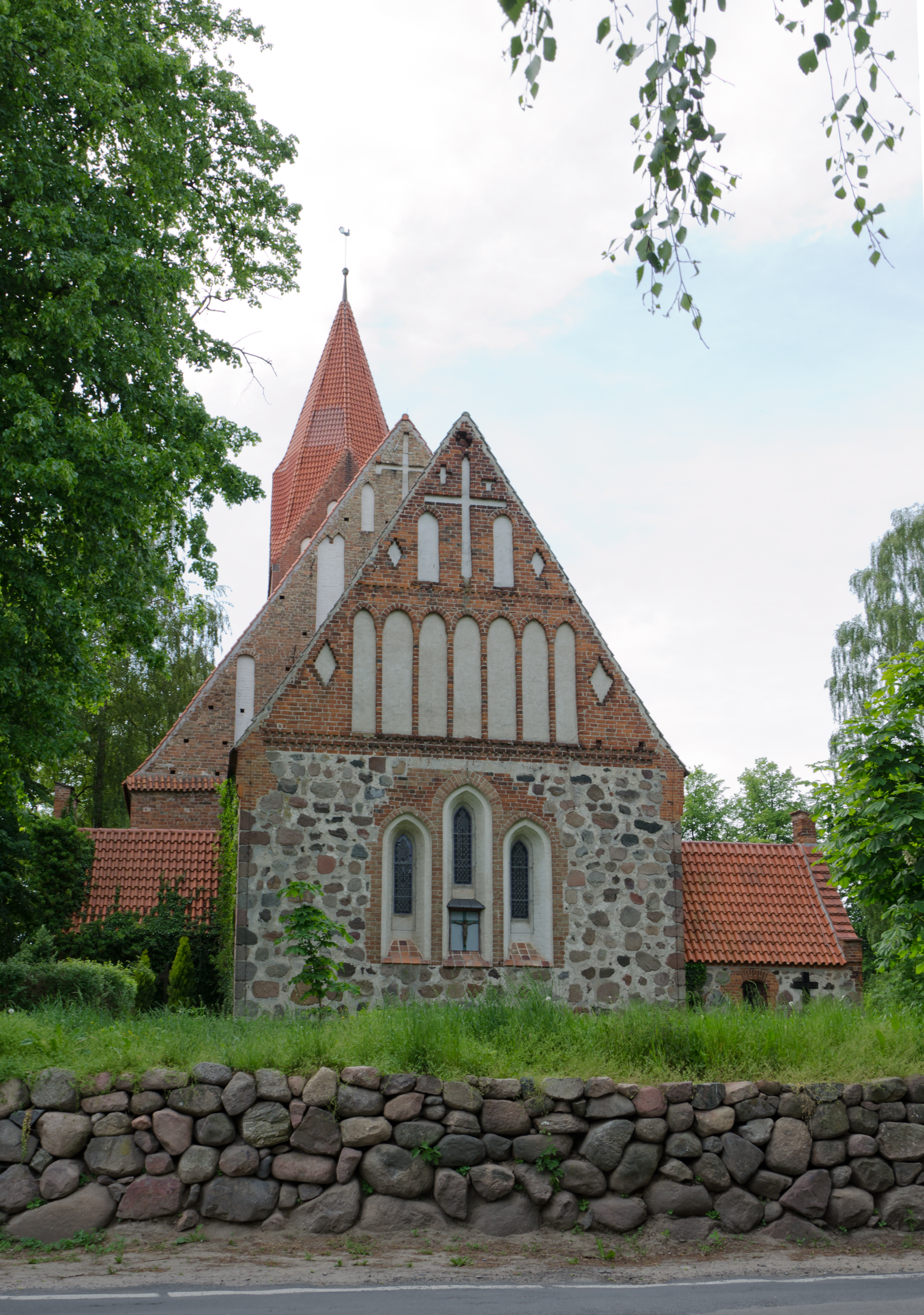 Kirche in Rostock-Biestow mit Feldsteinmauer